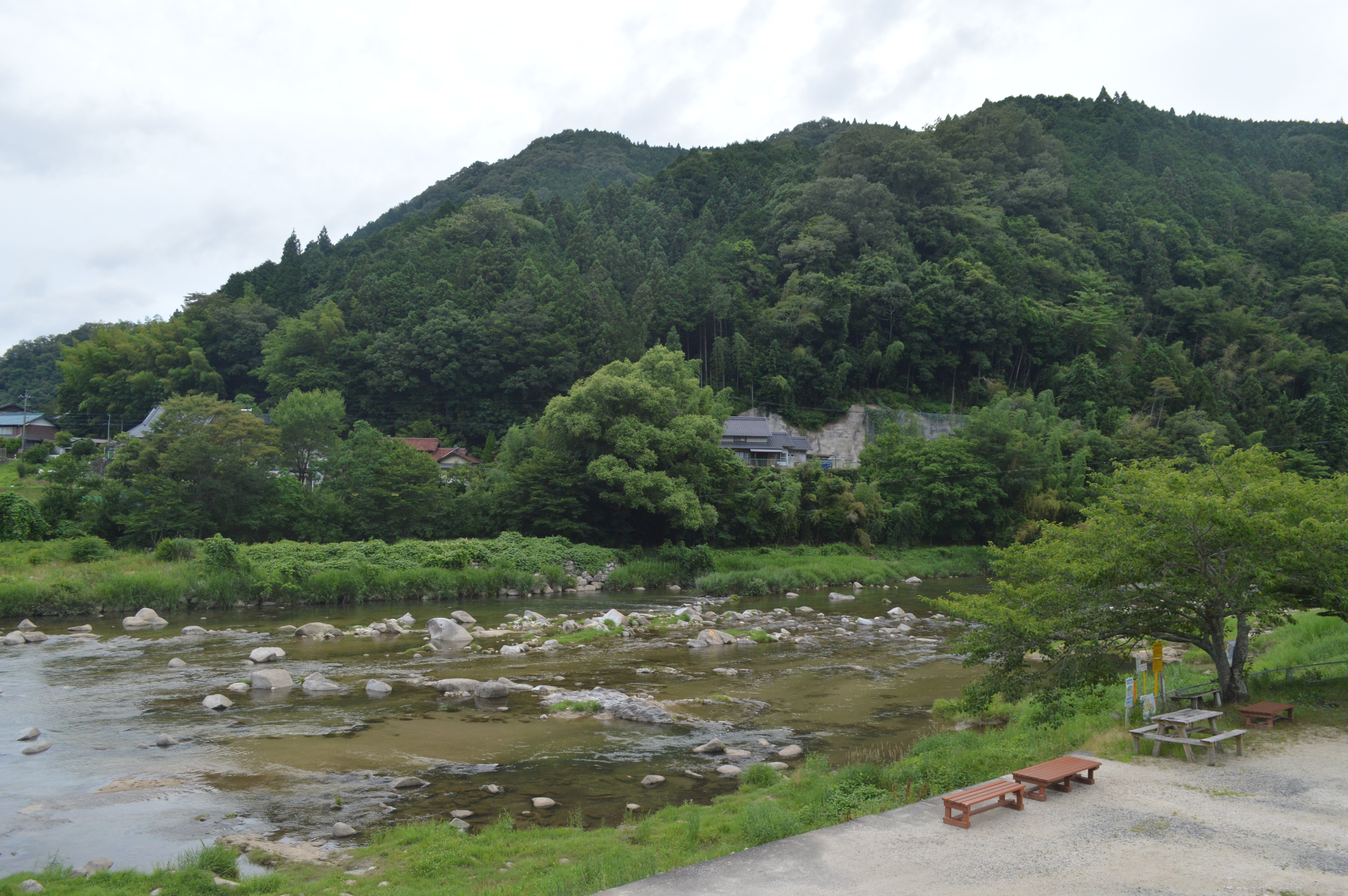 矢作川。愛知県豊田市小渡町。